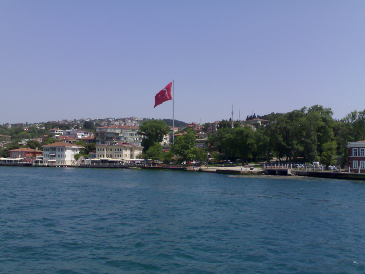 anadolu yakası